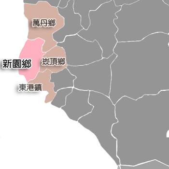 屏東縣新園鄉相對位置。